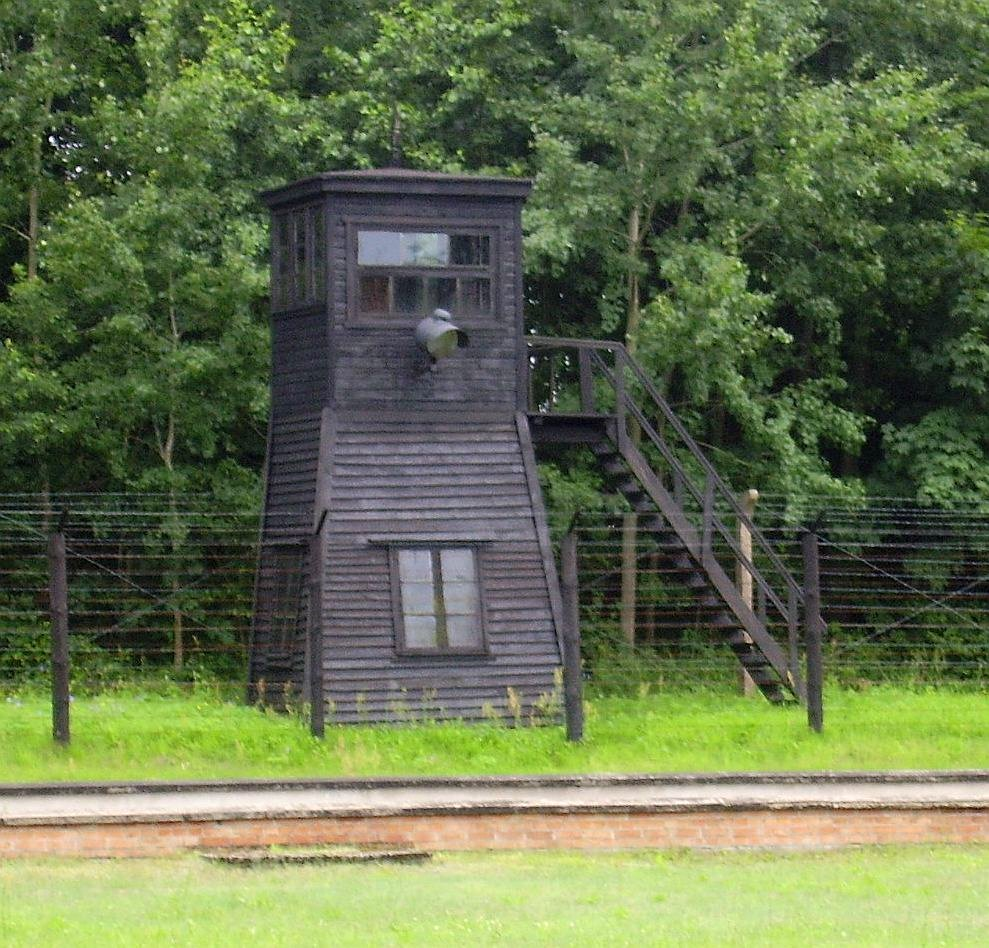 Wieża strażnicza w KL Stutthof